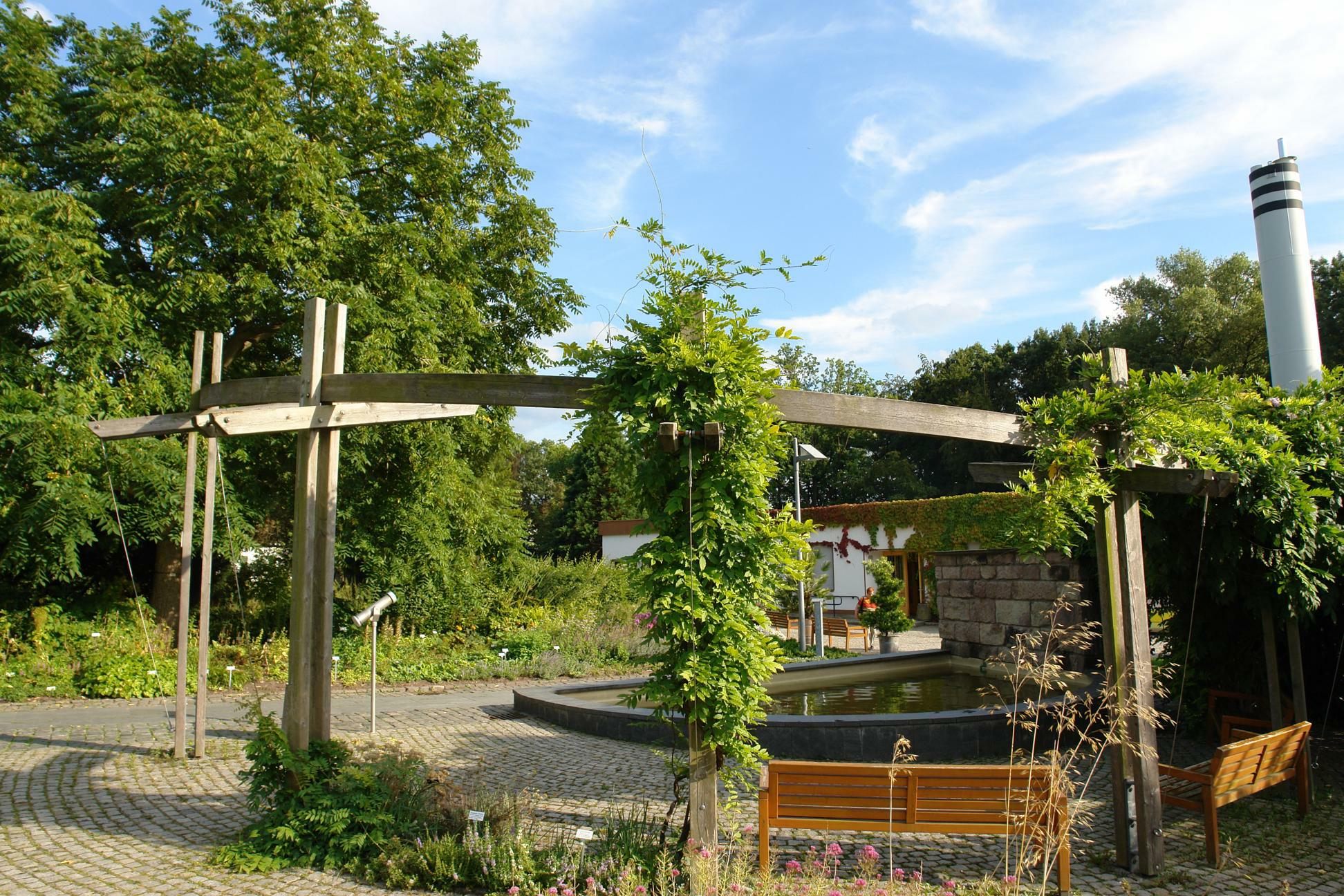 Botanischer Garten Chemnitz